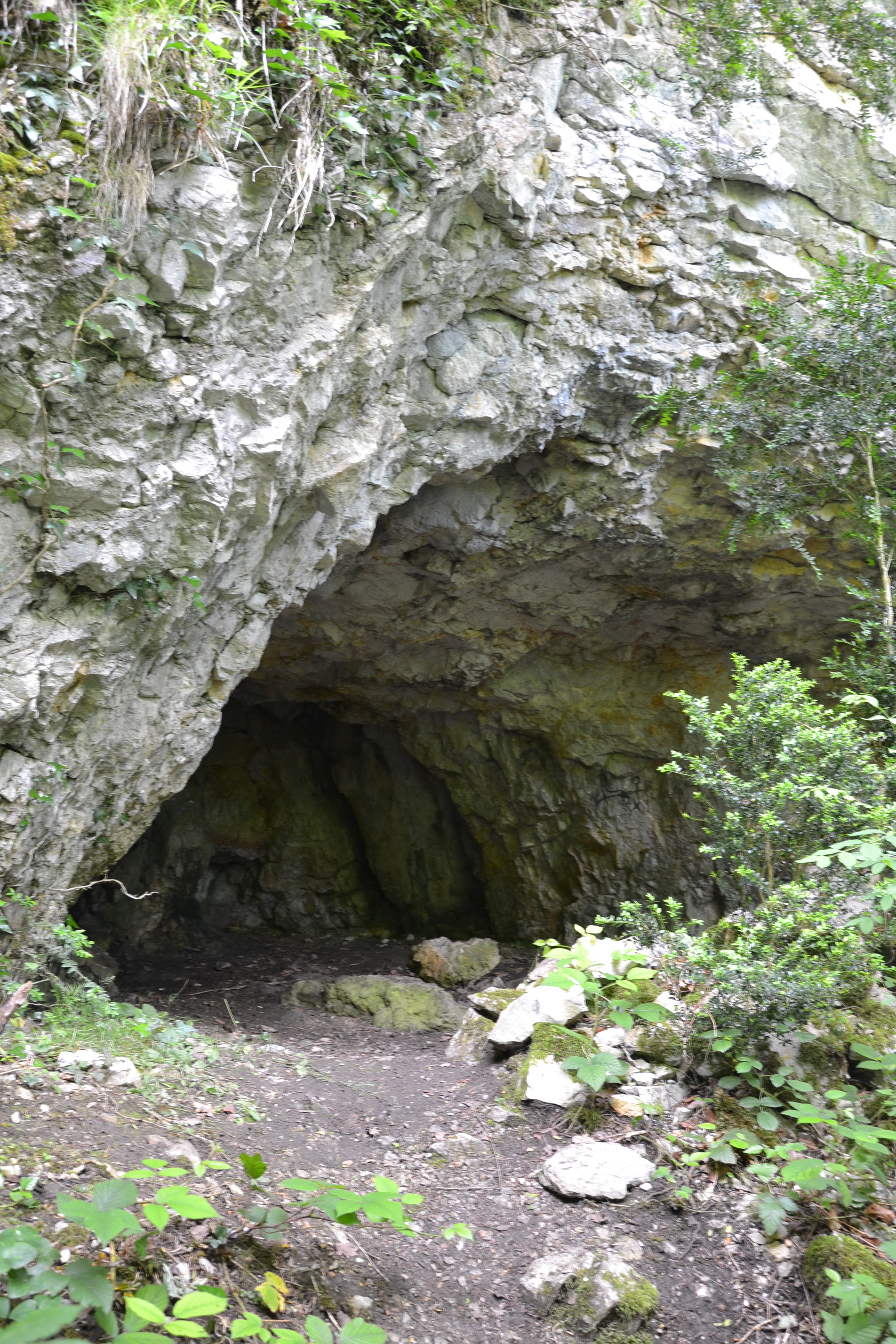 Grotte près de Puivert (Aude, France), ayant servi de poste de commandement au maquis de Picaussel en 1944.